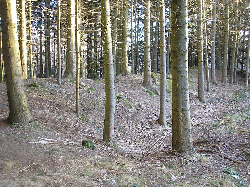 Frühmittelalterliche Abschnittsbefestigung bei Straßberg (Stadt Bobingen, Landkreis Augsburg, Bayerisch-Schwaben). Der Hauptwall nach Süden. Eigene Aufnahme, Feb. 2007 / Early Middle Ages hill fort near Straßberg (Bobingen, Landkreis Augsburg, Bavaria, Germany). The central earthworks, looking south. Own photo, Feb. 2008